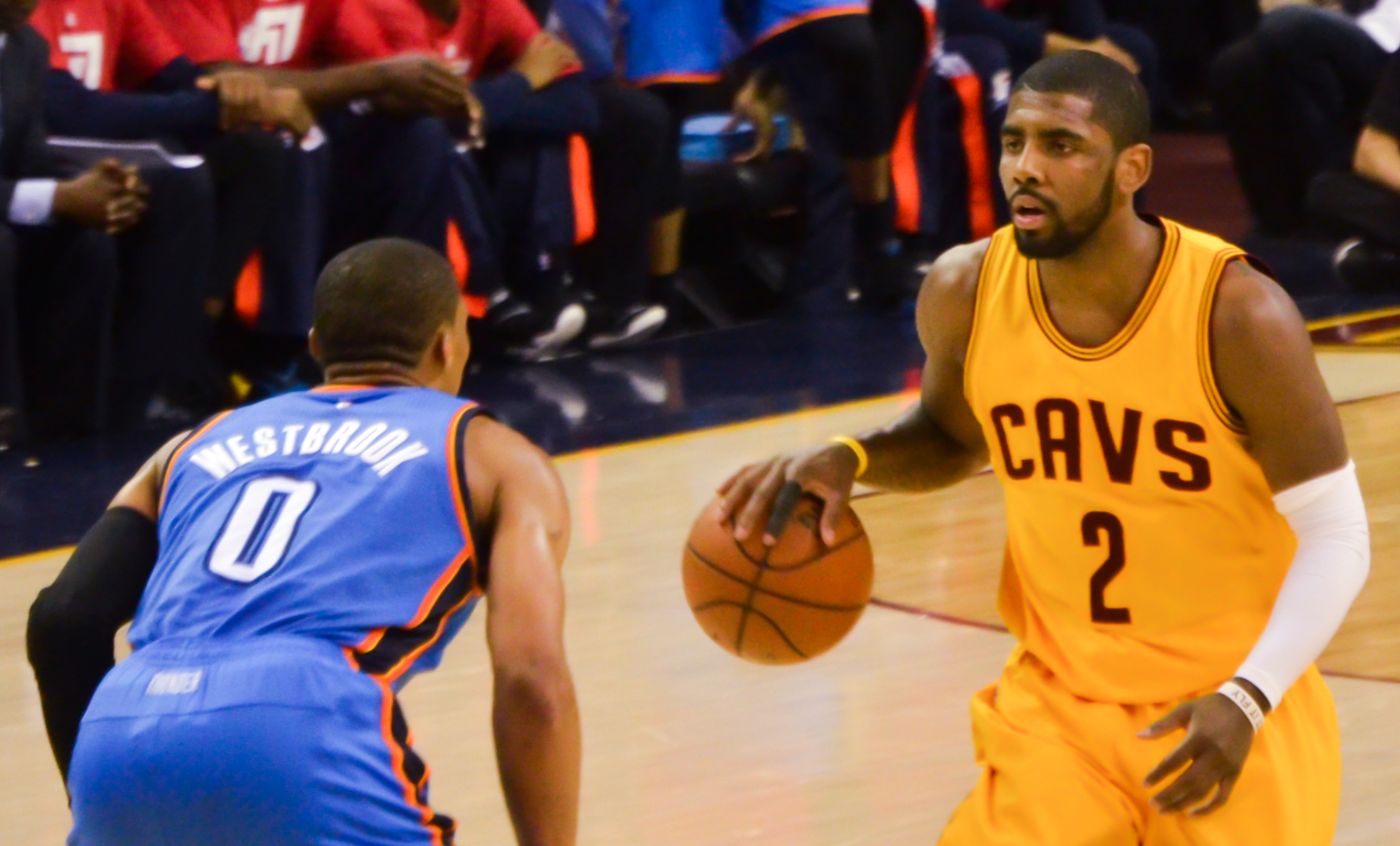 Kyrie Irving